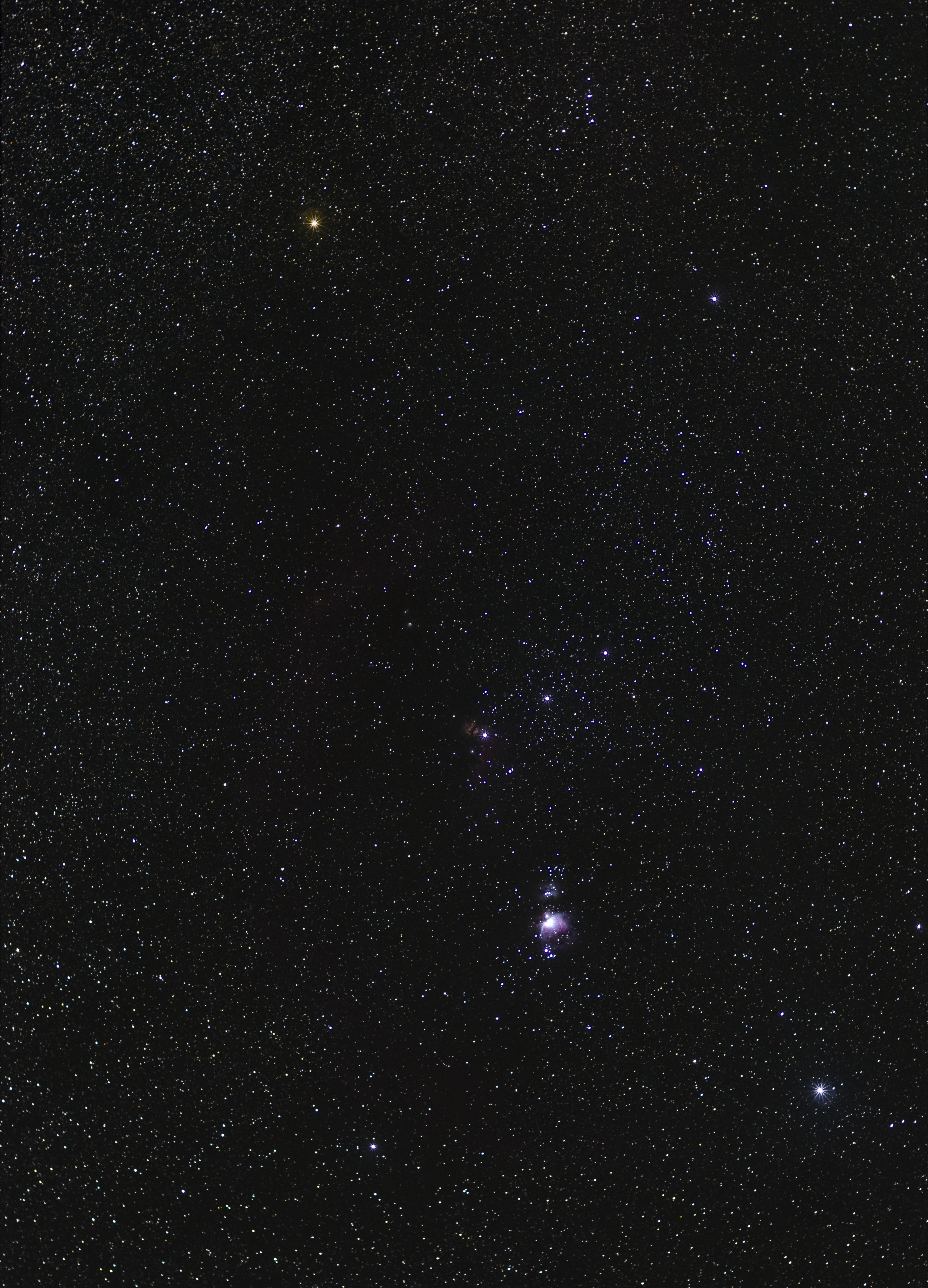 Constelación de Orion, vista desde el hemisferio sur.